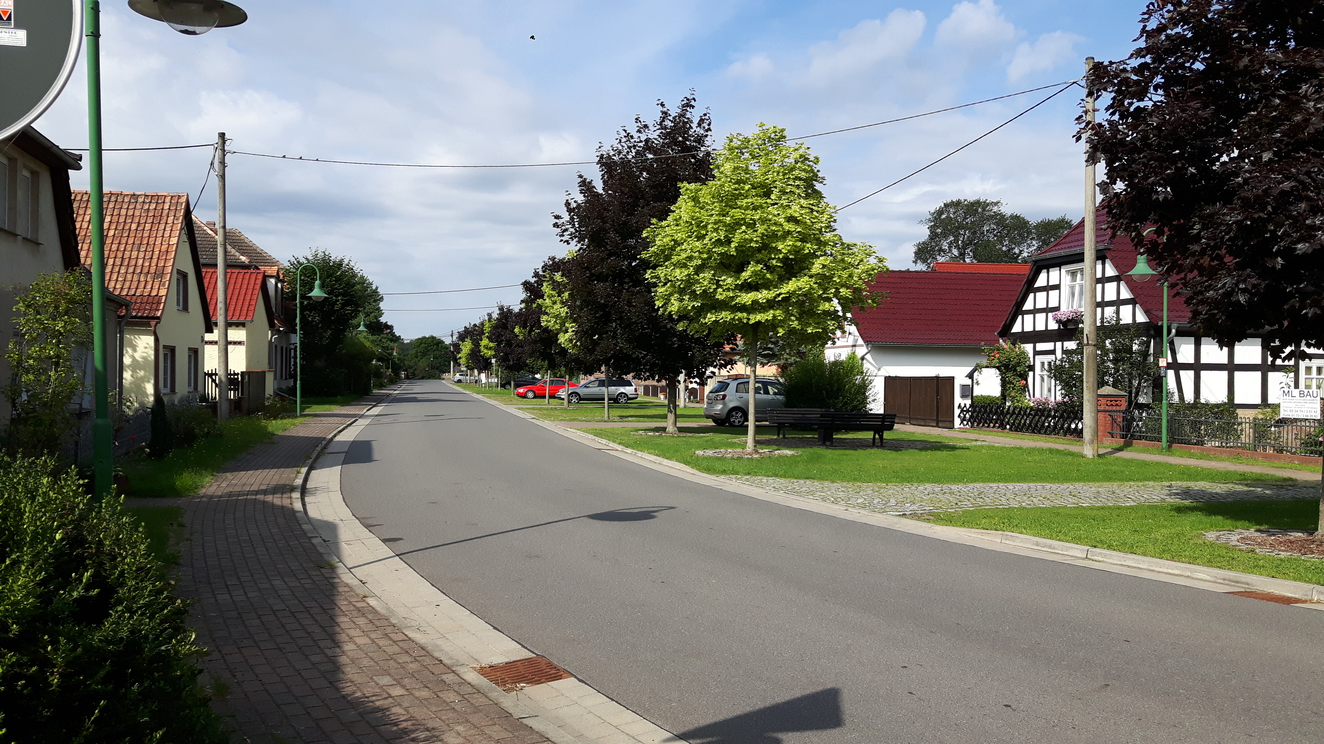 Ortsdurchfahrt Reichwalde